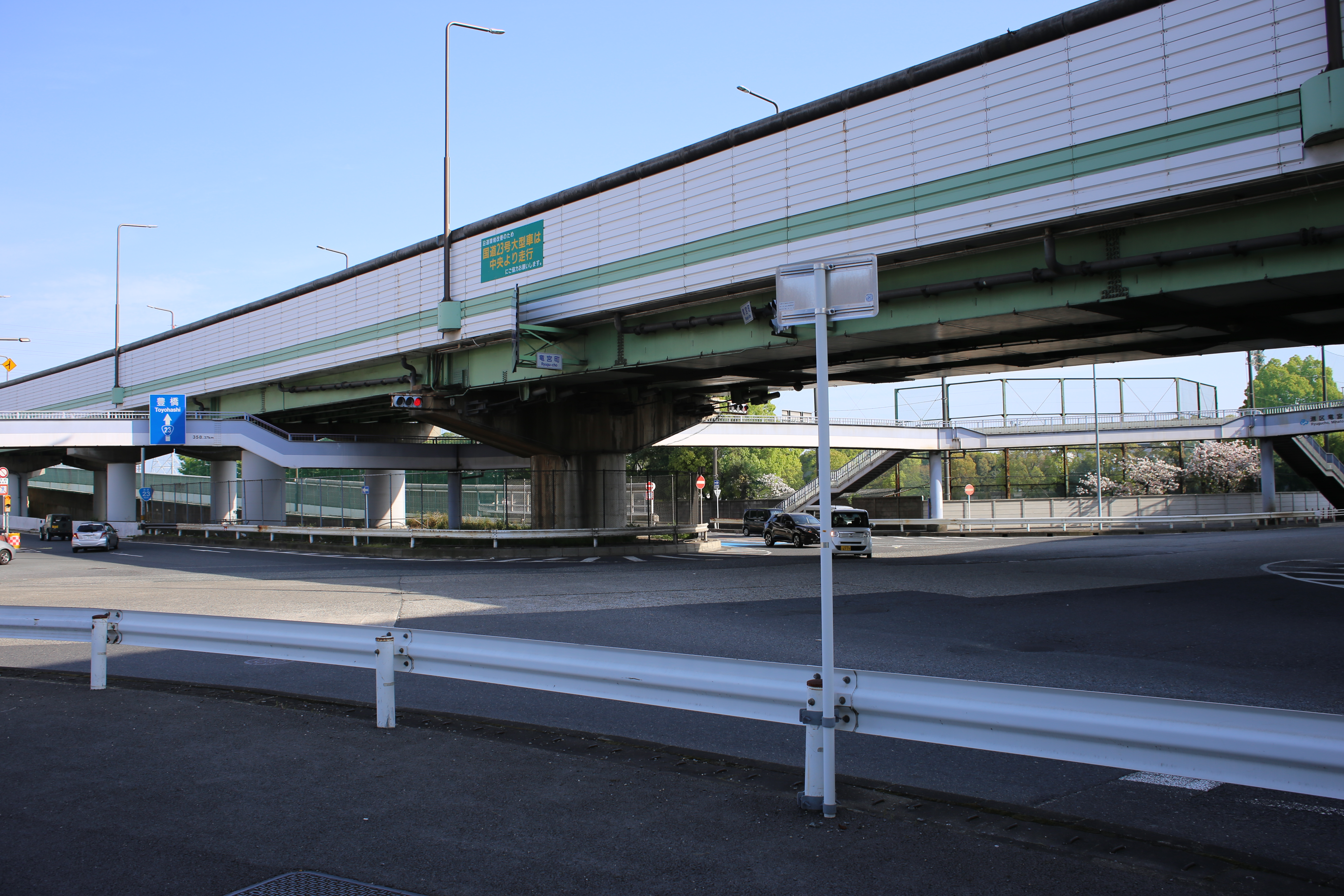 港区竜宮町の竜宮インターチェンジを北西角から撮影